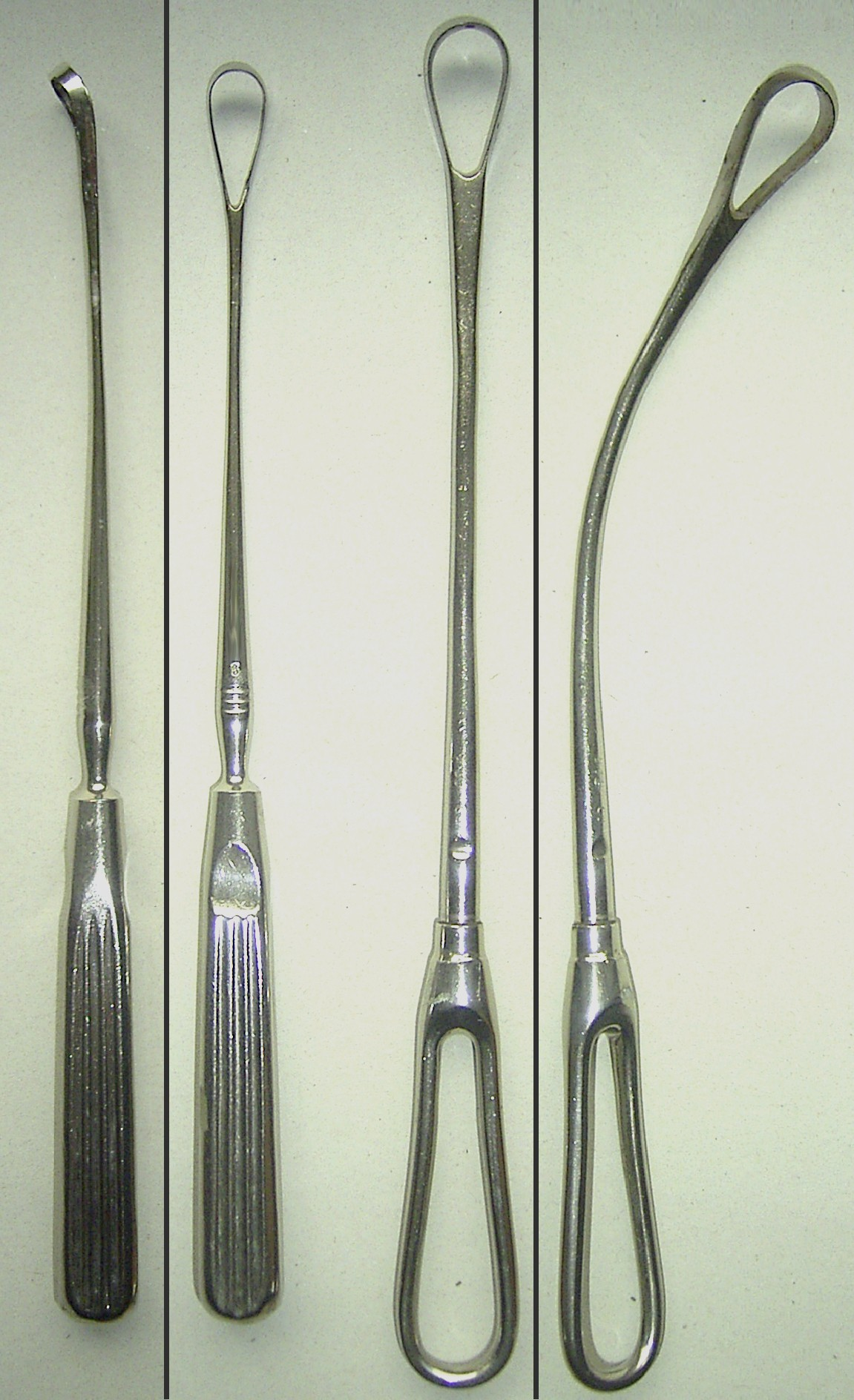 Zwei stumpfe Curetten. Die Kante der Innenwölbung ist zwar scharfkantig, jedoch nicht scharf geschliffen und dient zum oberflächlichen abschaben von Material. Die Außenseite ist völlig stumpf. In der Mitte des Bildes sind beide Curetten in Draufsicht. Daneben montiert, links eine Seitenansicht und rechts mit verformtem Schaft. Die Linke ist aus gehärtetem medizinischen Stahl. Sie ist 25,5 cm lang die Öse hat eine maximale Weite von 11 mm. Die Rechte hat einen Schaft aus plastischem Stahl, der nach bedarf angeformt werden kann. Diese Curette ist 28 cm lang mit einer Öse von 16 mm weite.